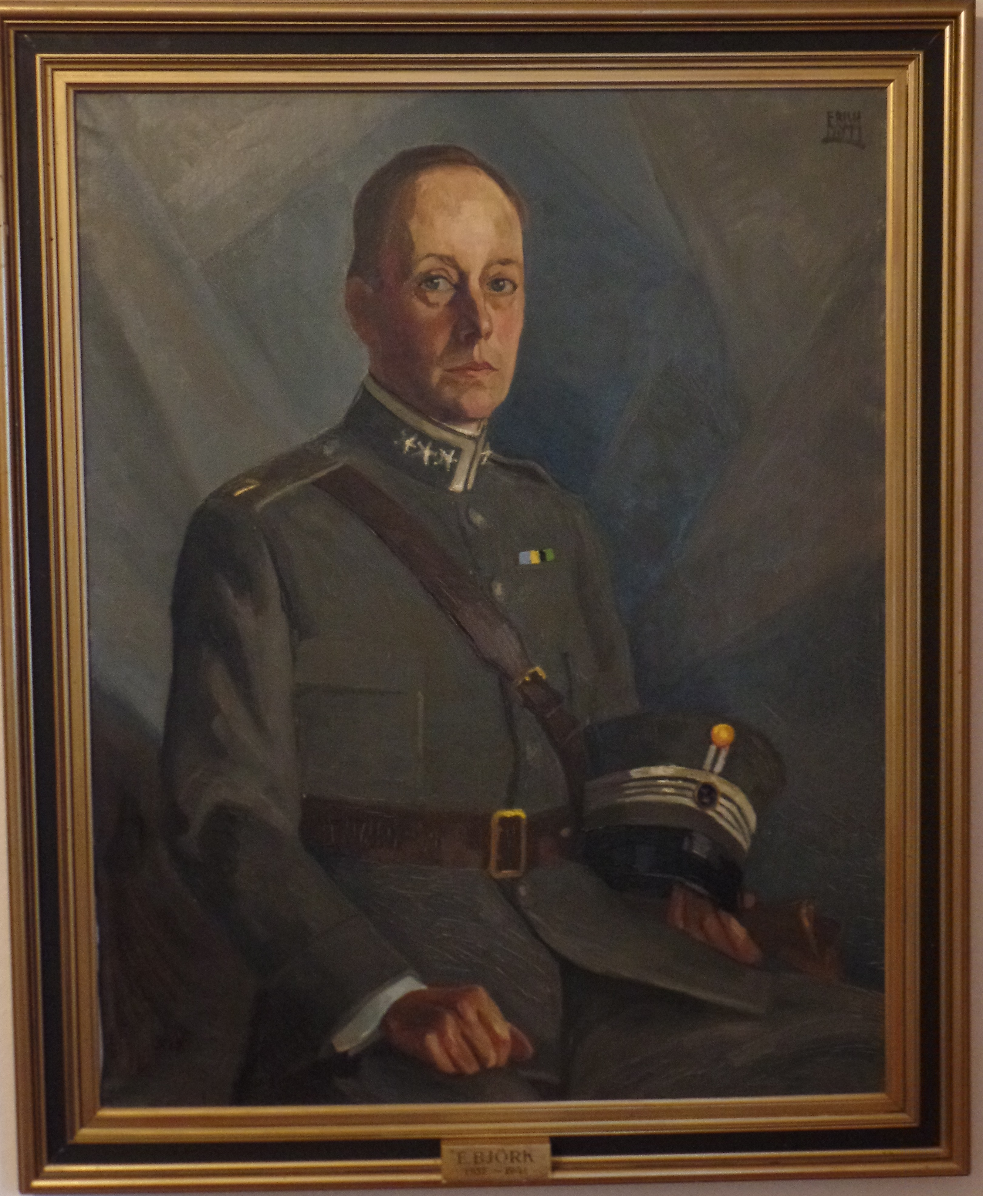 Avfotograferat porträtt som finns vid södra skånska regementet.